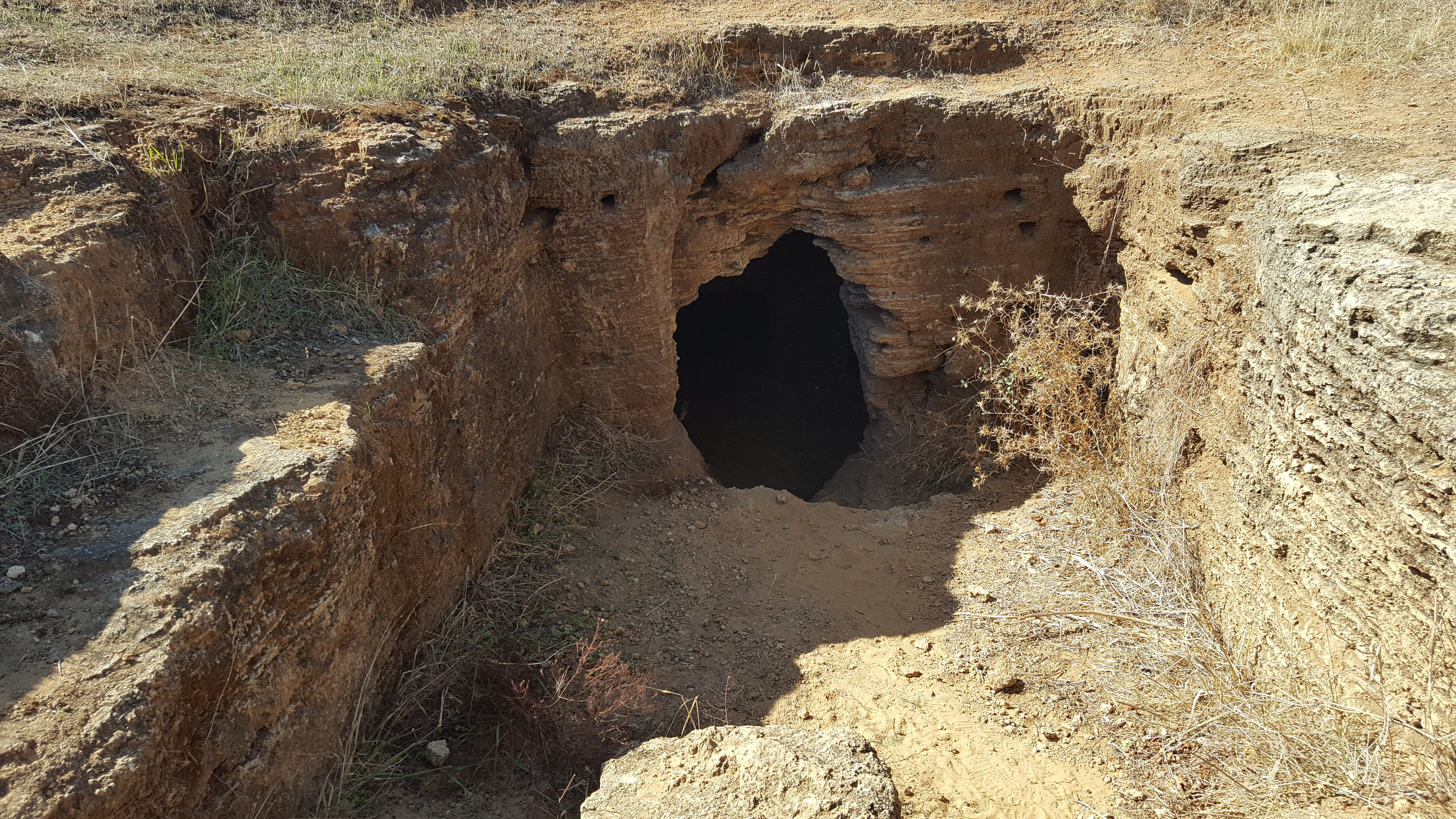 20171111_121116.jpg